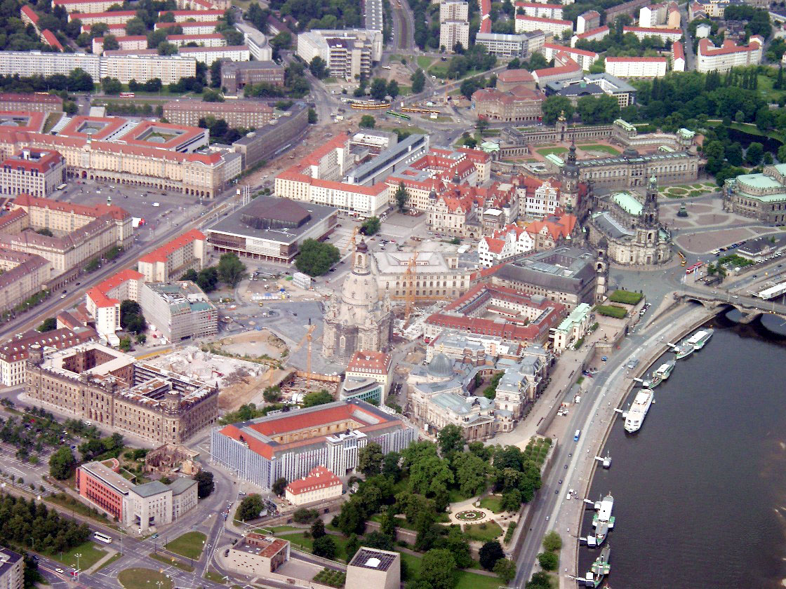 Luftbild der Dresdner Altstadt aus Richtung Osten